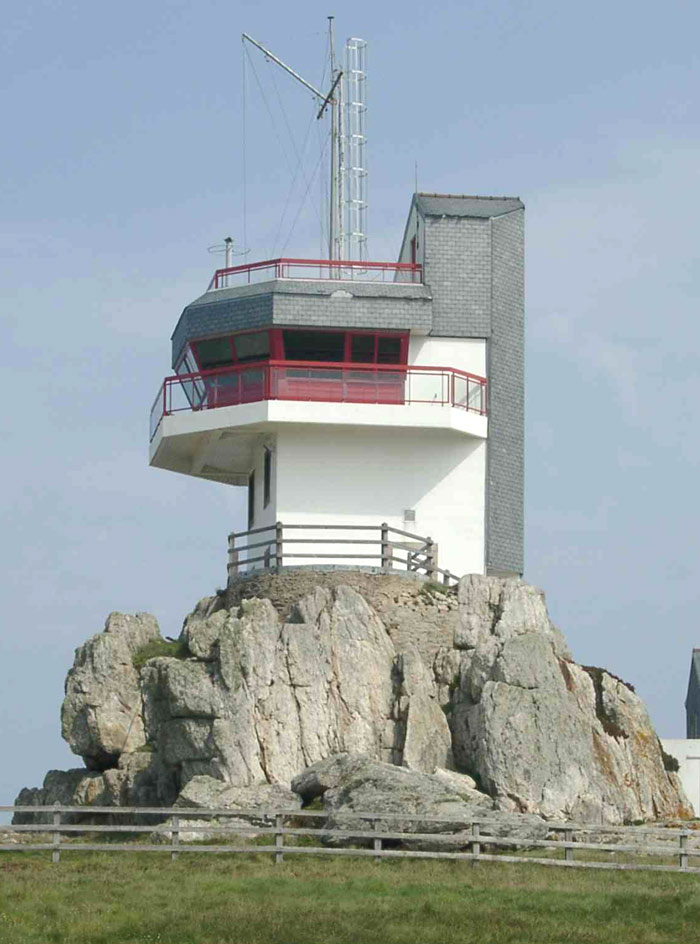 Description : Sémaphore de Creach à Ouessant (Bretagne, France) Place : Ile de Ouessant, Bretagne, France date : 2004 auteur : Pline photo personnelle